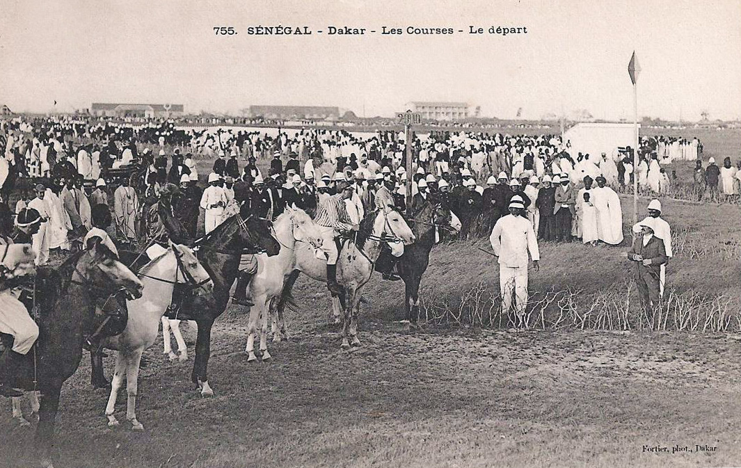 François-Edmond Fortier, Dakar. Les courses. Le départ. Afrique Occidentale - Sénégal.